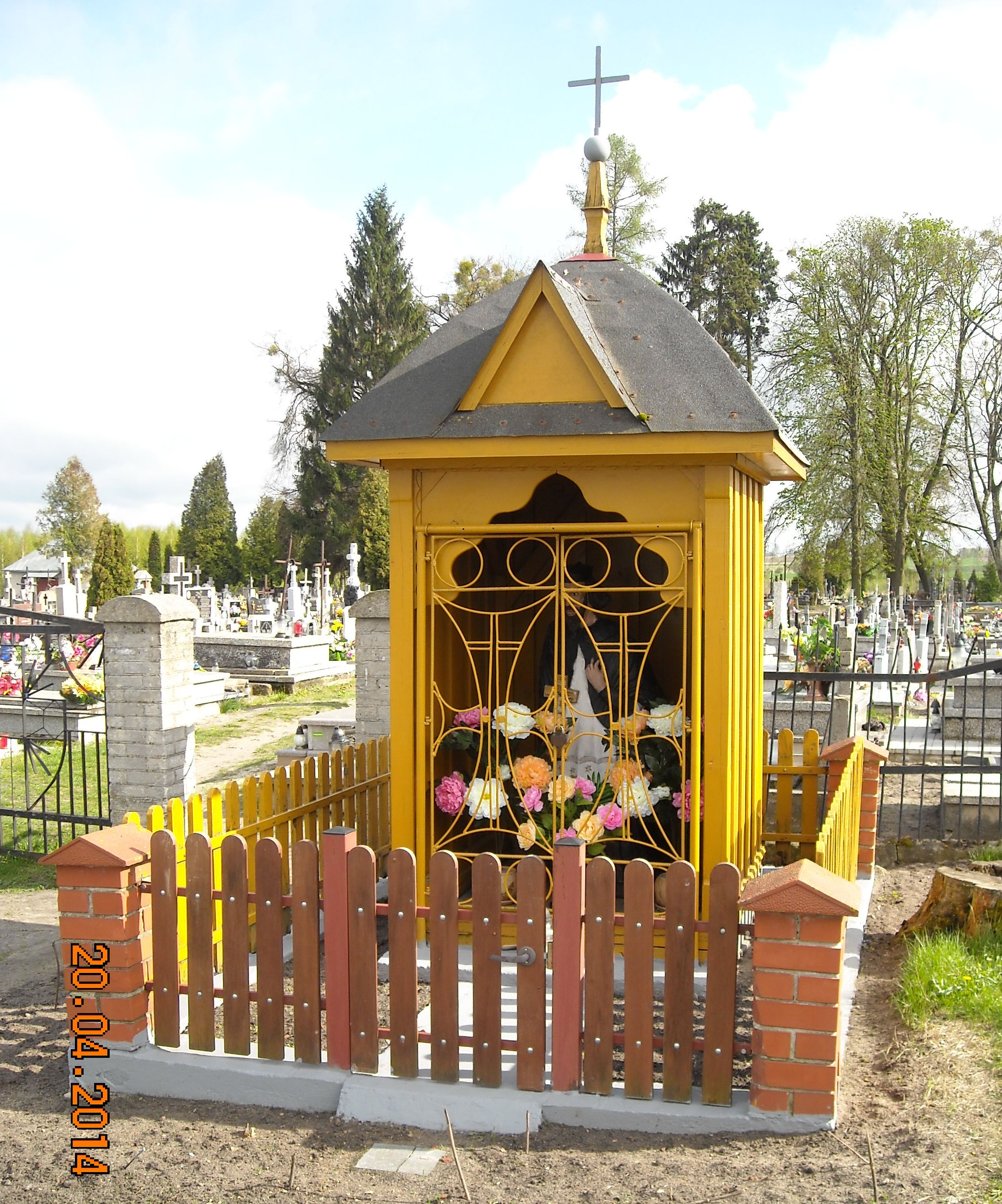 Kapliczka św. Jana Nepomucena w UhruskuLatina: Uhrusk (Polonia, palatinatus lublinensis, districtus wlodaviensis), sacellum sancti Joannis Nepomuceni